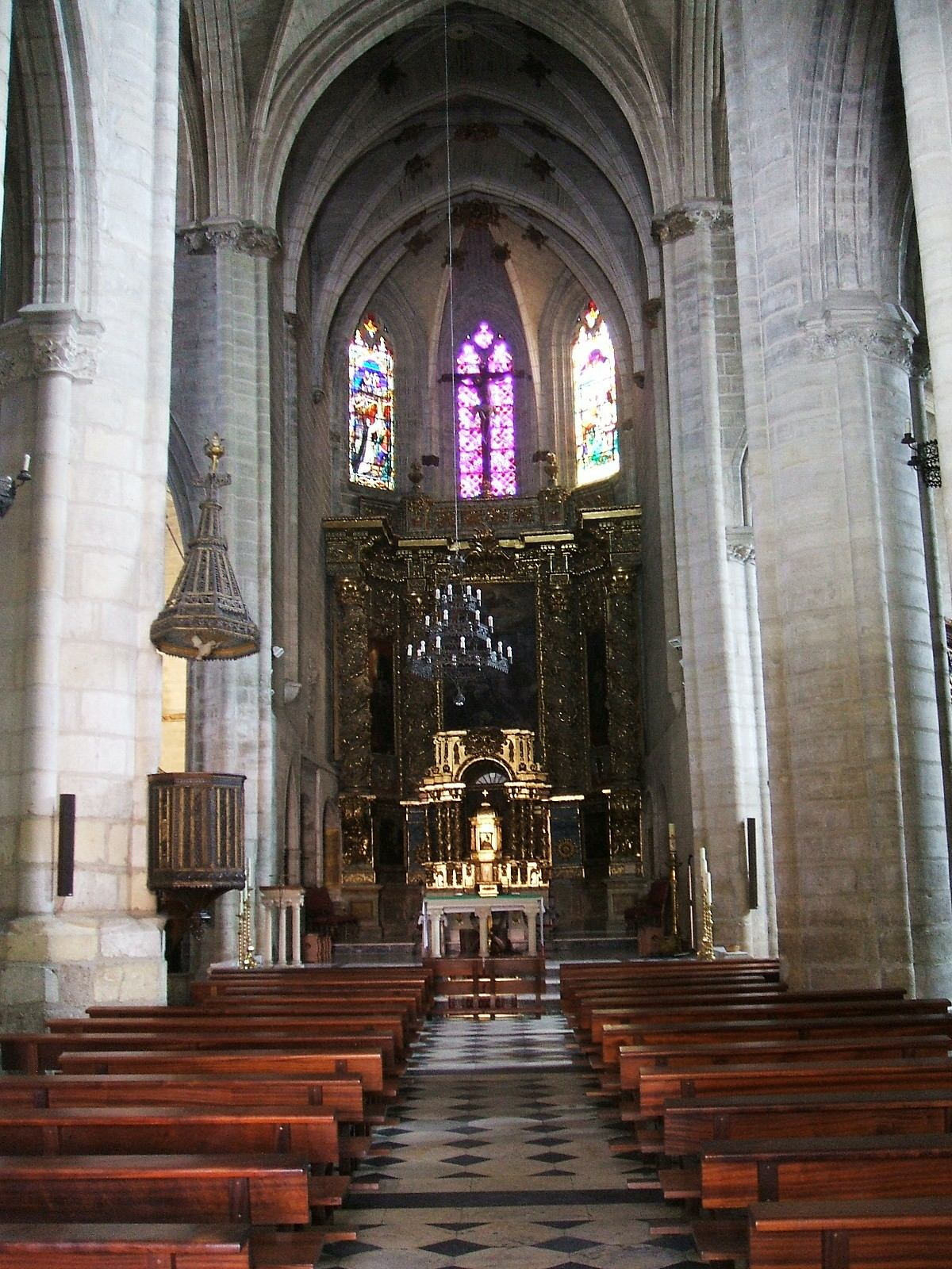 Iglesia de San Gil Abad, Burgos (España)